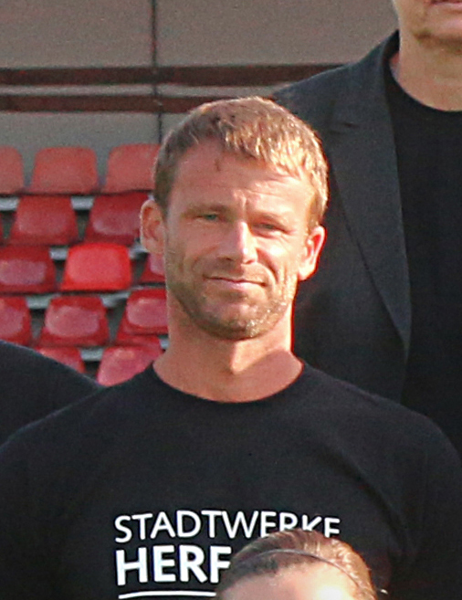 Herforder SV Borussia Friedenstal Team 2014/2015